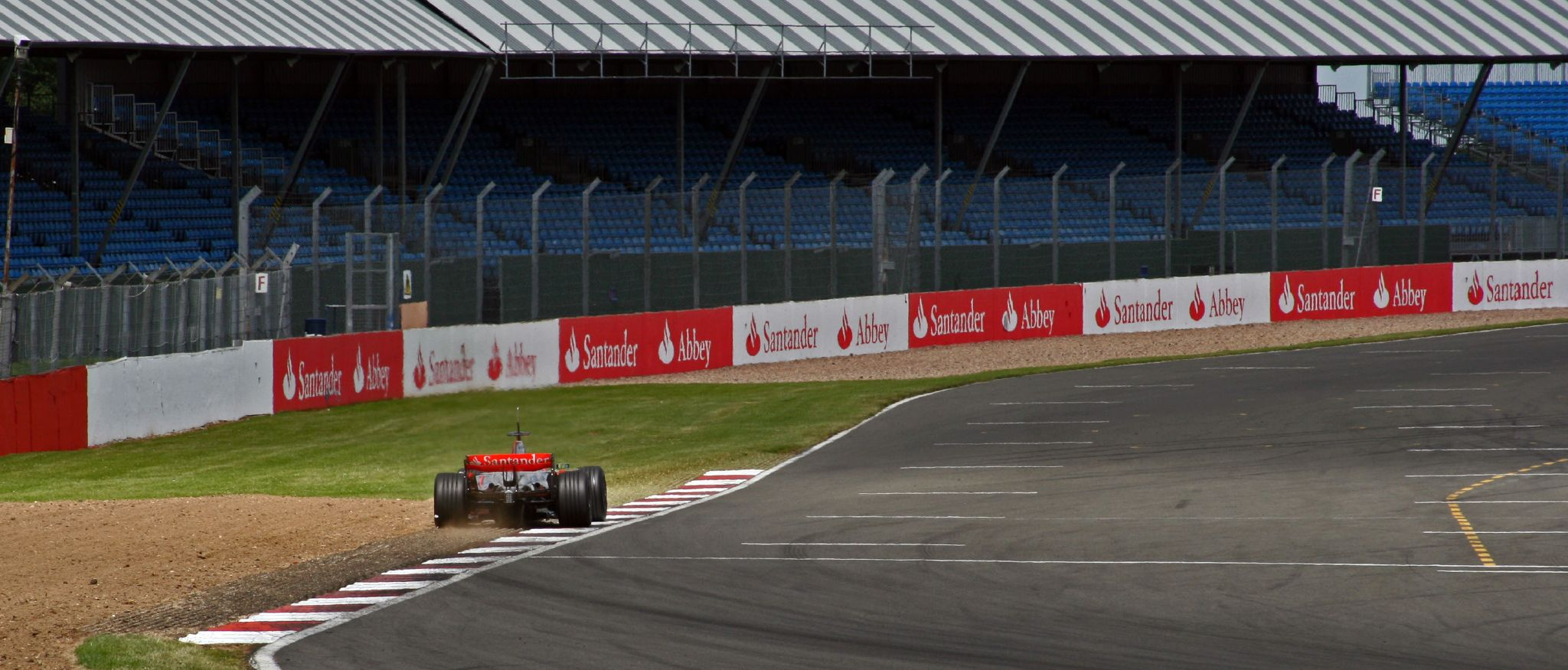 Lewis Hamilton